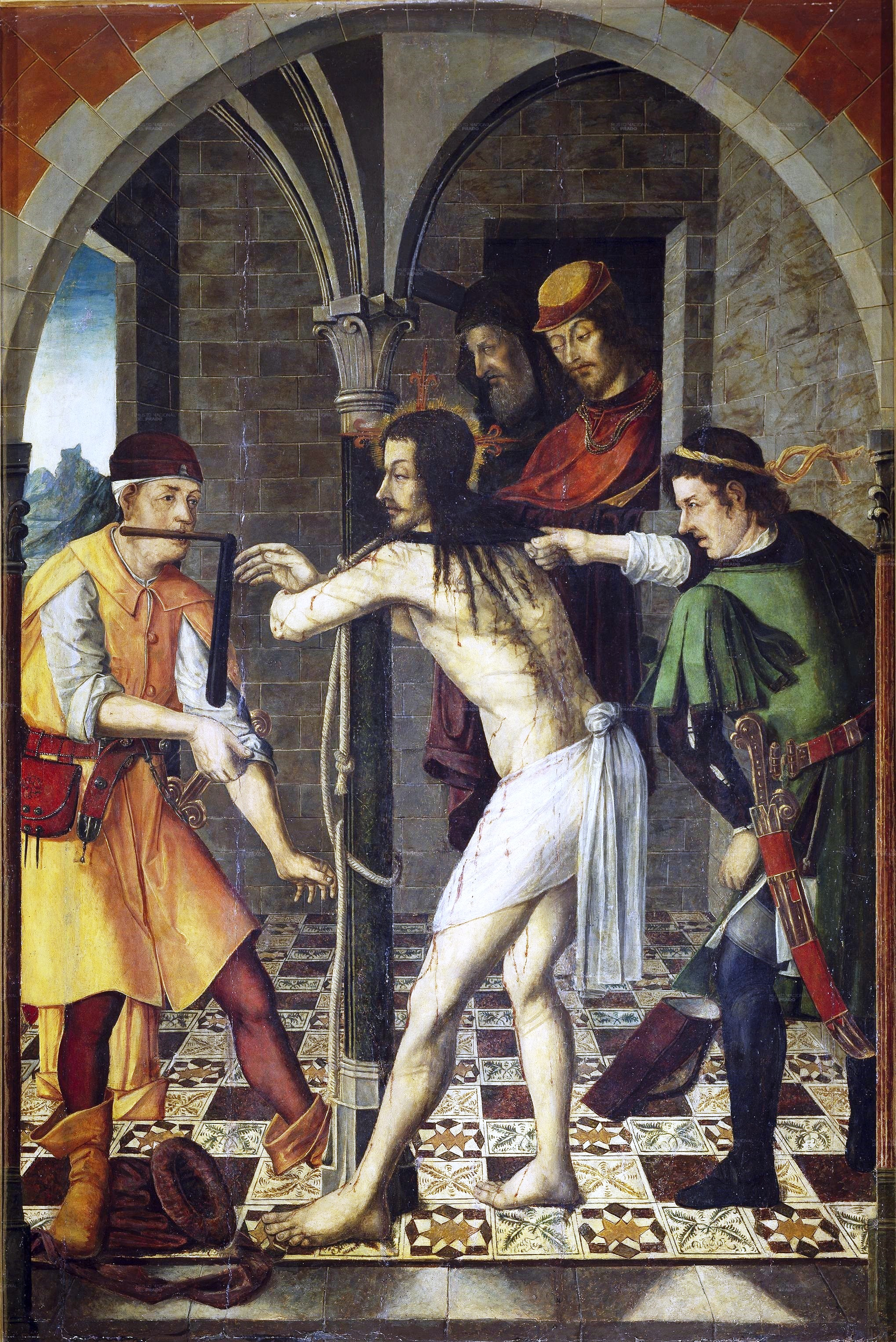 La obra representa el momento en que Jesucristo fue azotado por los soldados romanos.